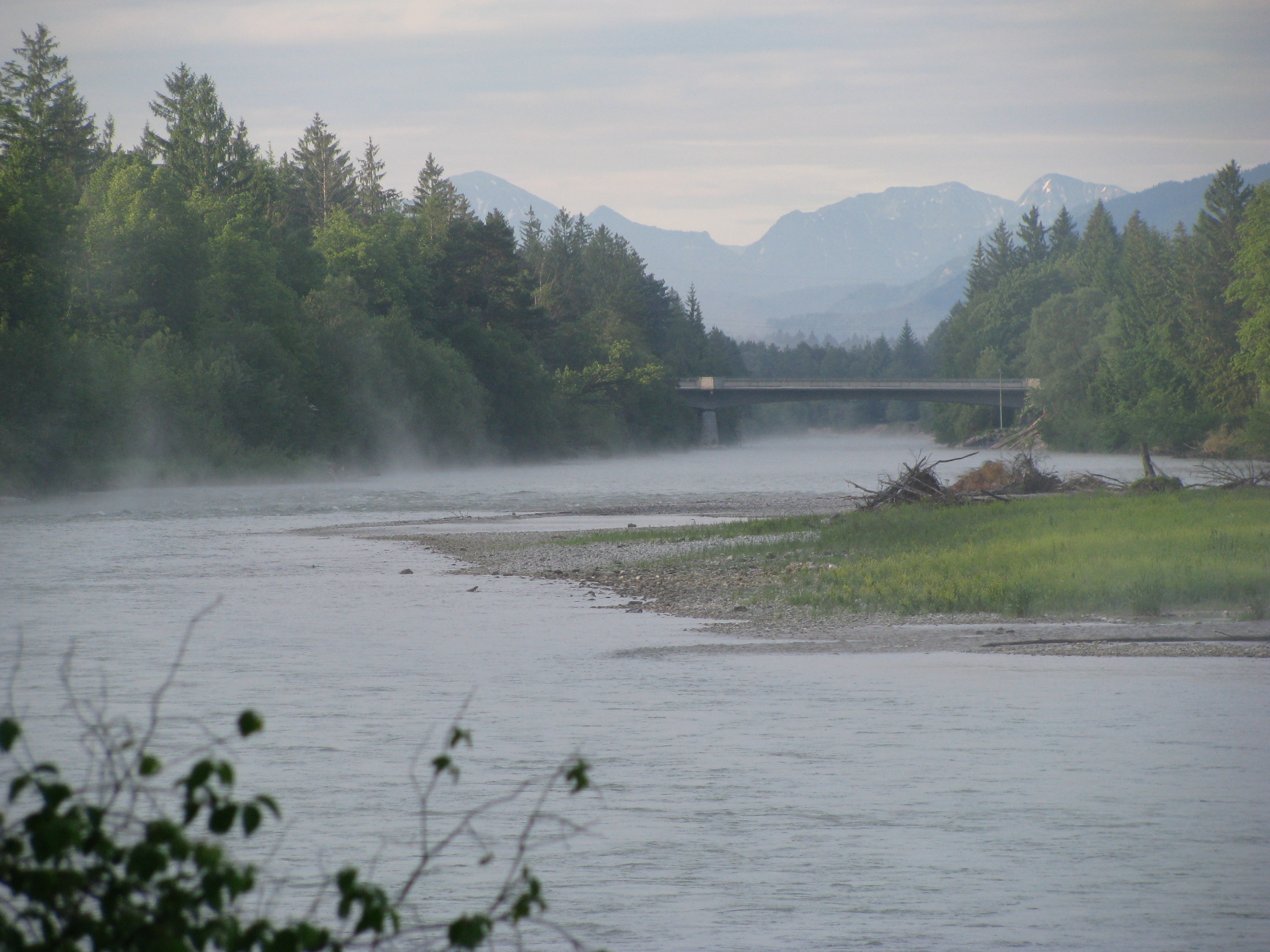 Die Isar im Bereich der Pupplinger Au mit Marienbrücke Wolfratshausen